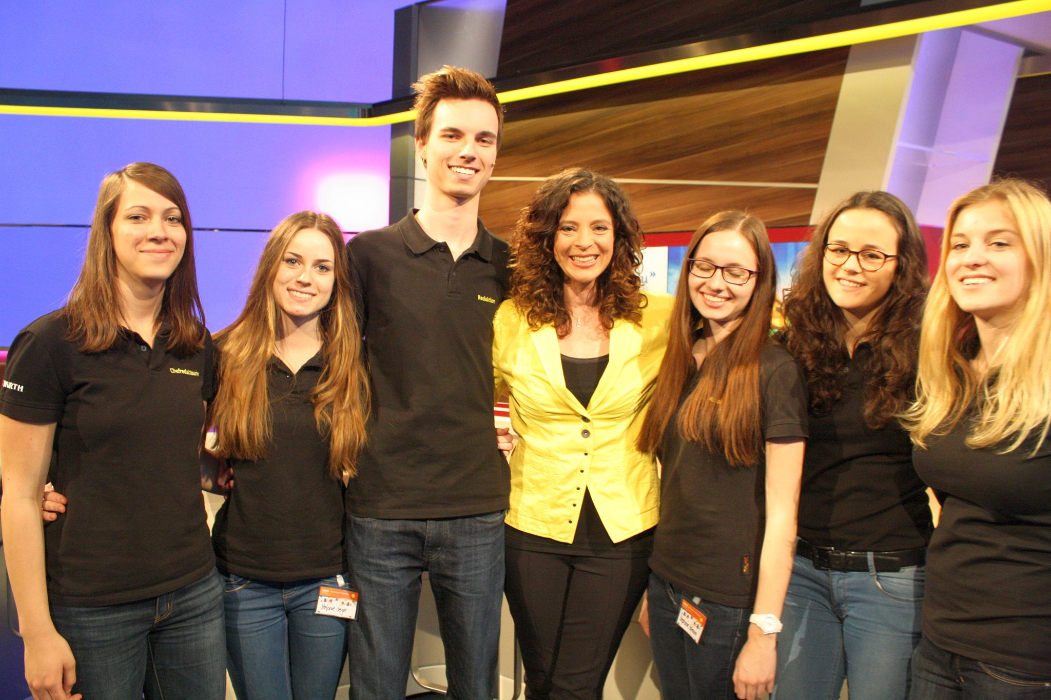 FT im SWR-Fernsehen bei der Medienwerkstatt 2014, Kaufmännische Schule Tauberbischofsheim